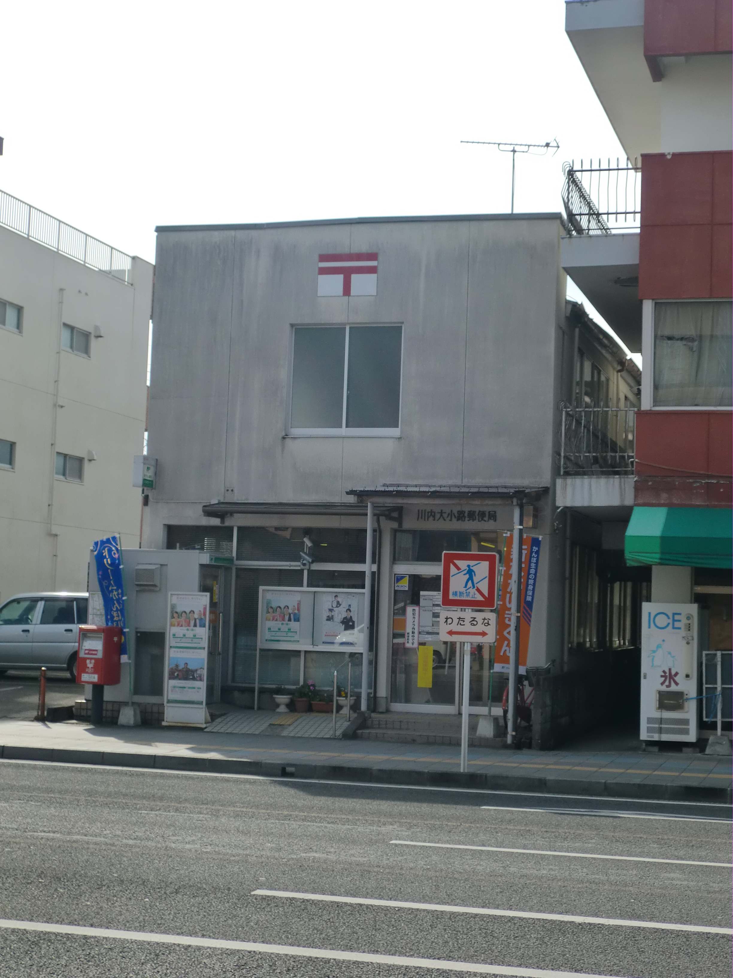 薩摩川内市にある川内大小路（せんだいおおしょうじ）郵便局